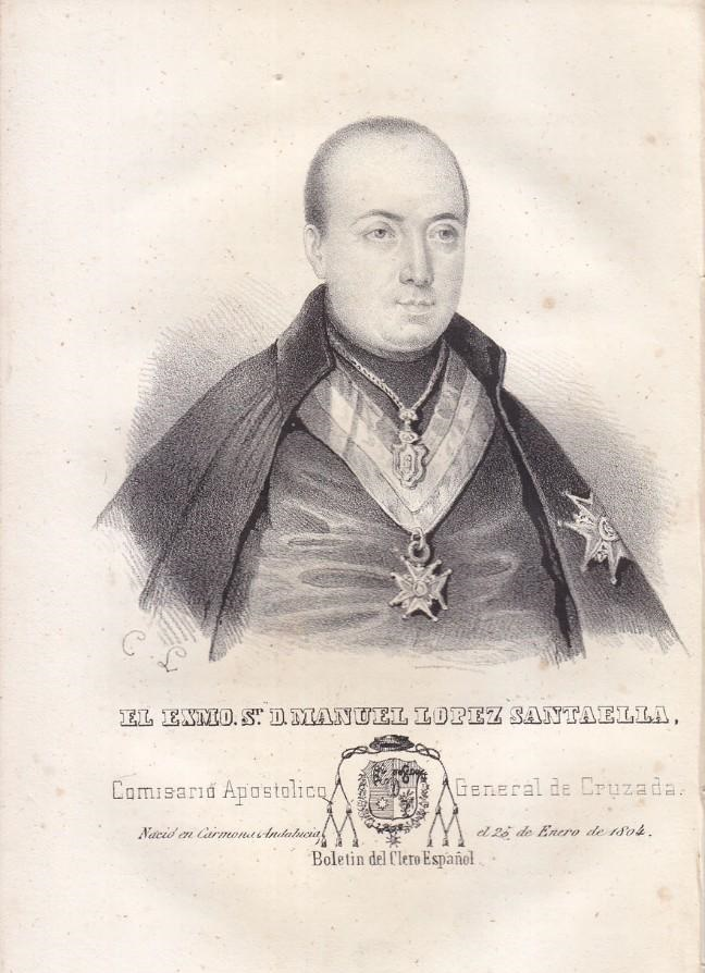 El Excmo. Sr. D. Manuel López Santaella, Comisario Apostólico General de Cruzada. Litografía de Luis Carlos Legrand para el Boletín del Clero Español